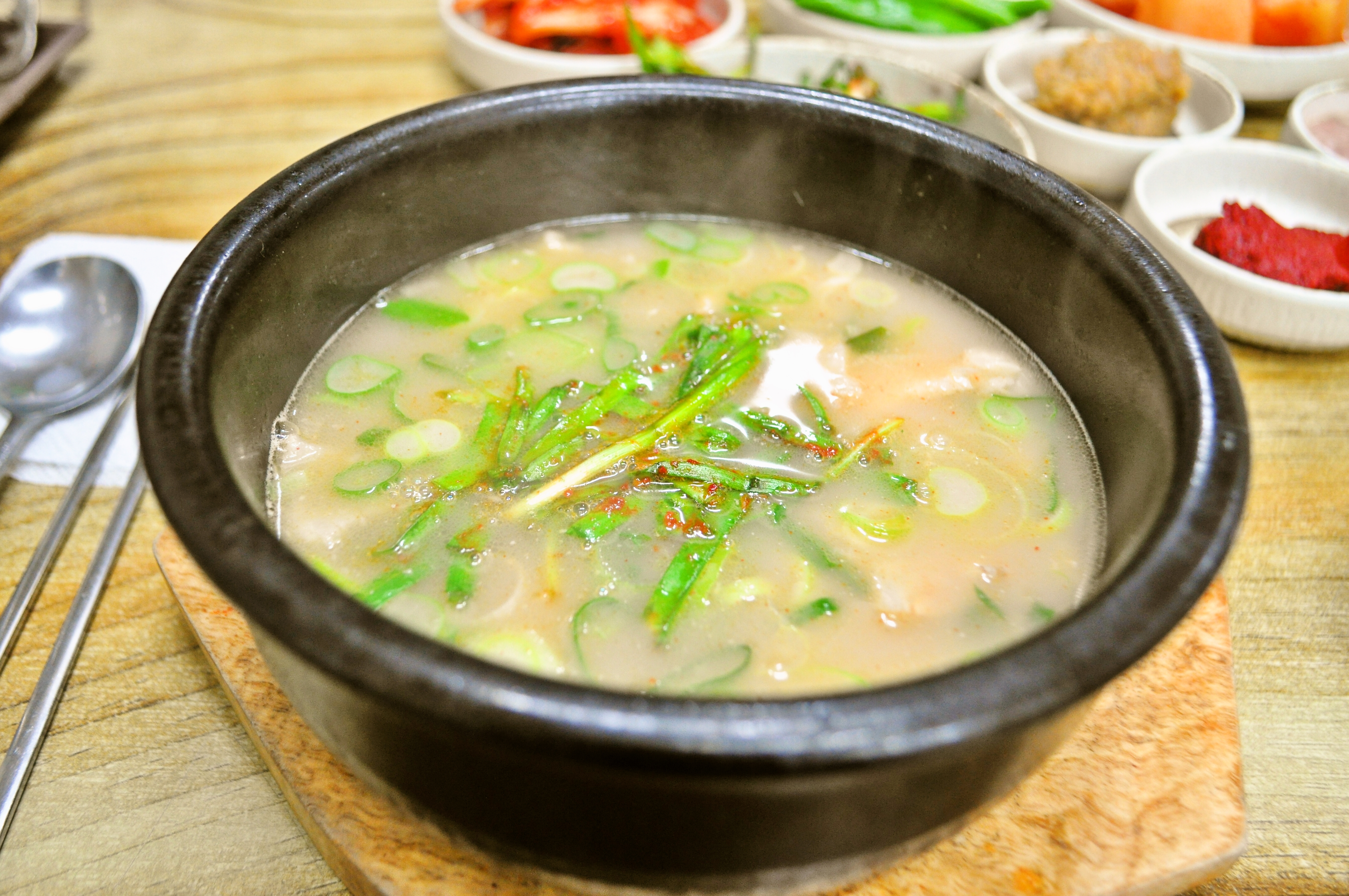 부산의 대표음식 중 하나인 돼지국밥